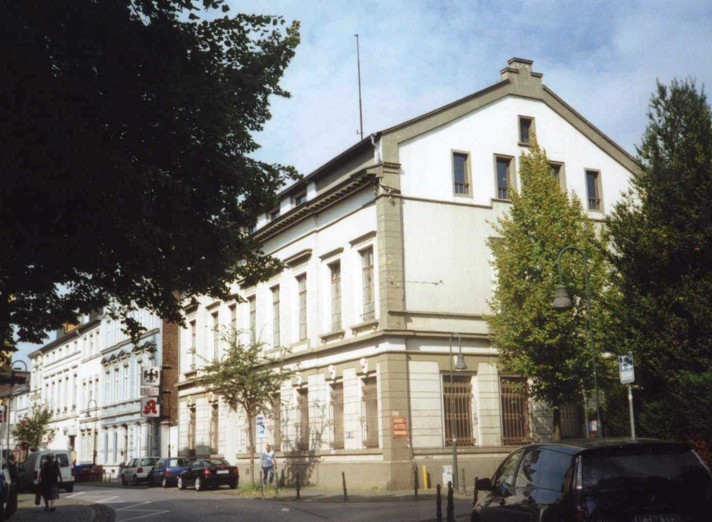 Kirschenhof Ecke Dürener Straße / Parkstraße in der Eschweiler Altstadt